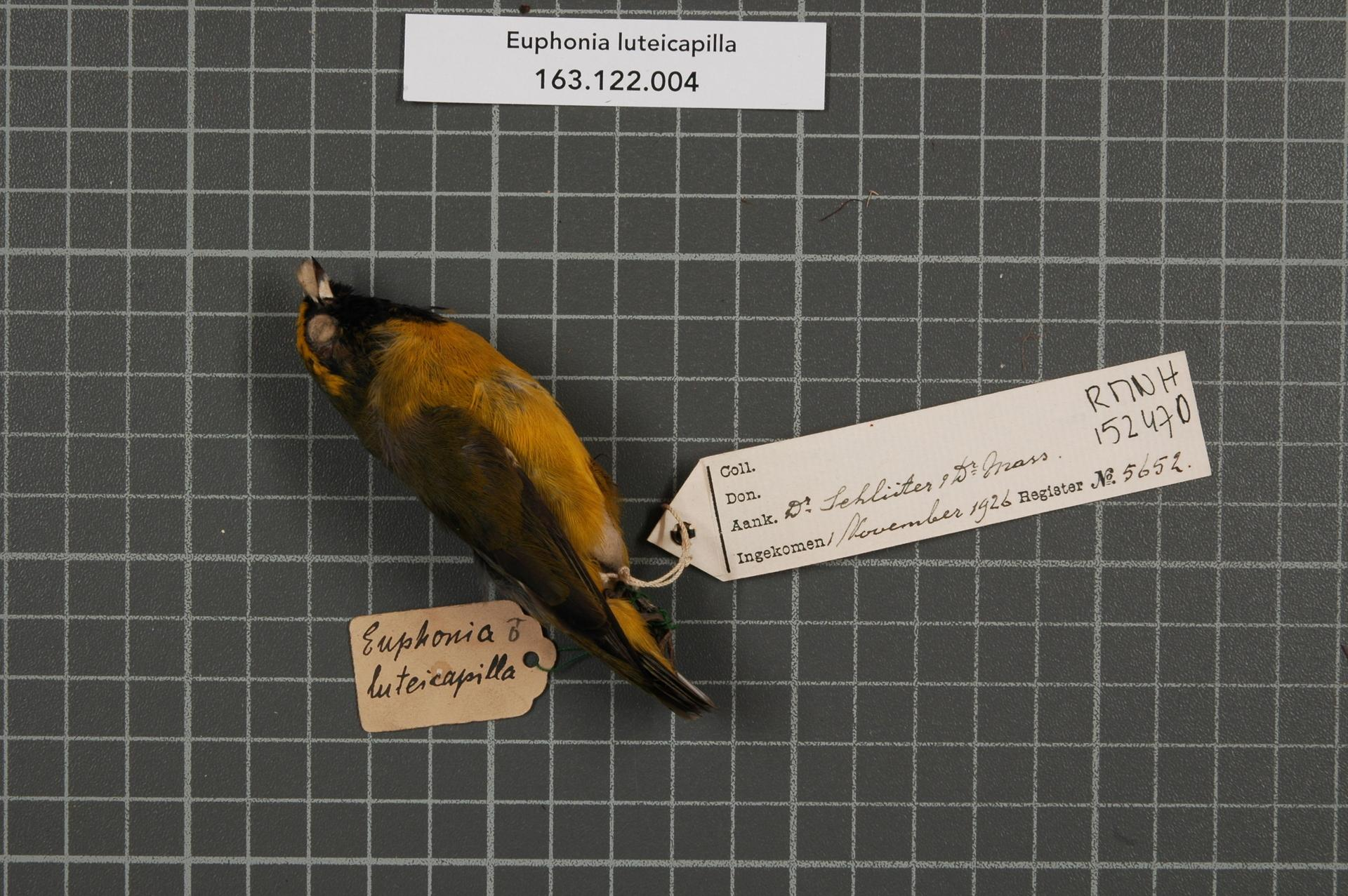 Euphonia luteicapilla (Cabanis, 1860)